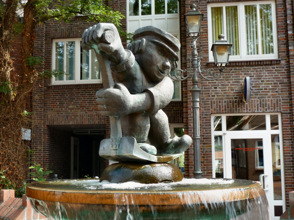 Jan-Schüpp-Brunnen in Wittmund, Ostfriesland